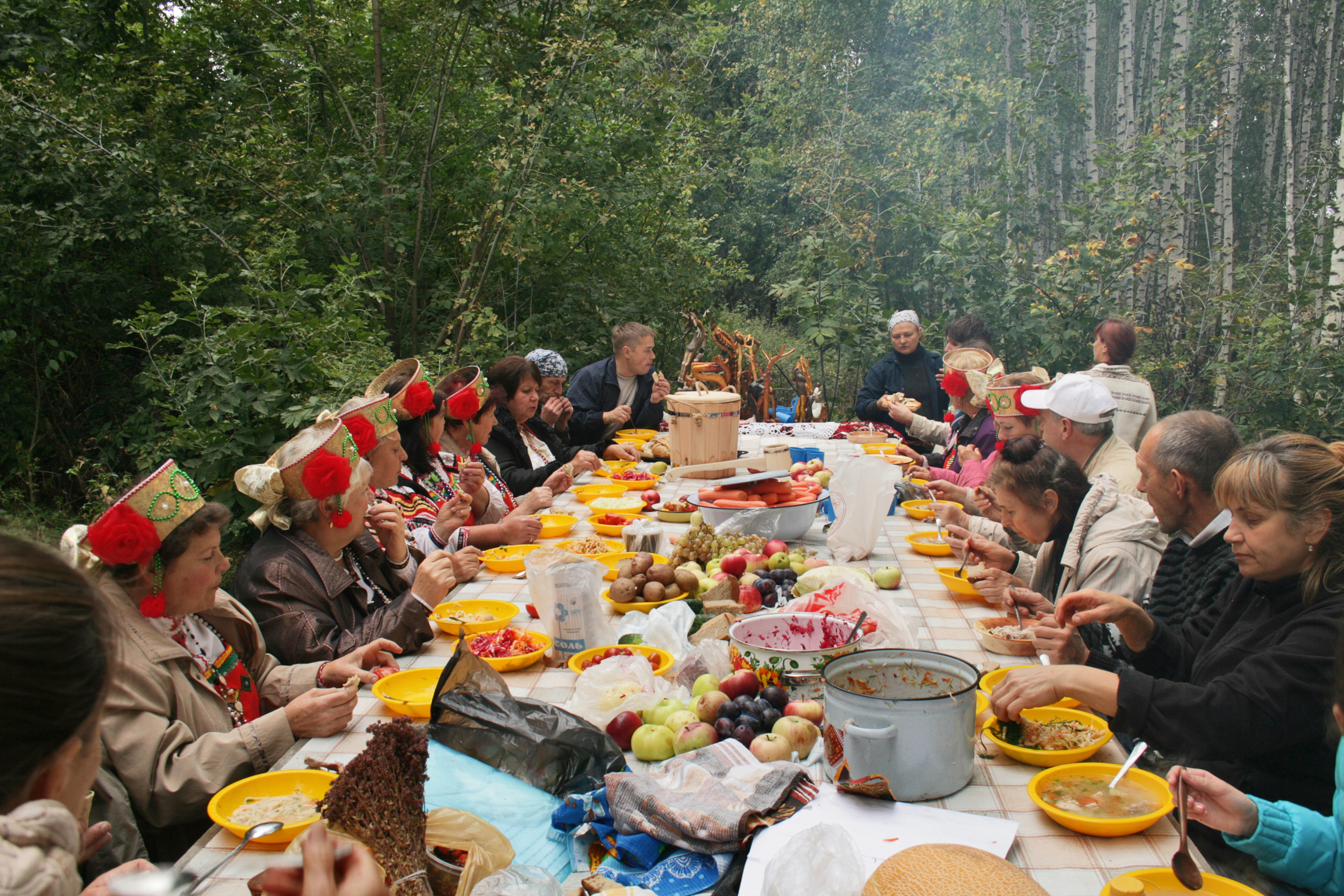 Праздник урожая встречи осени (Осенины) в родовом экопоселении «Кореньские родники». Белгородская облась, 2013.